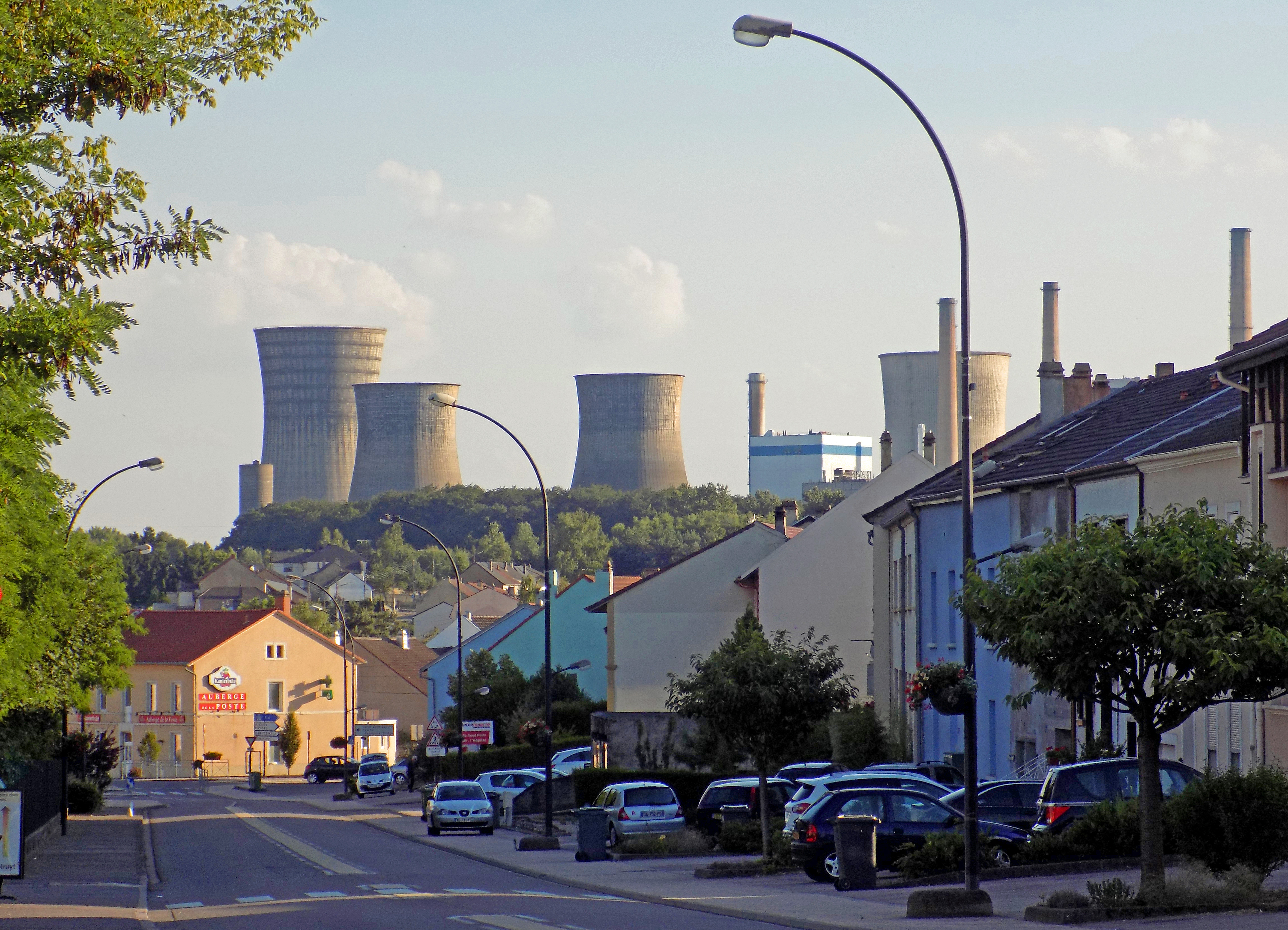 La centrale thermique Émile Huchet vue de la rue Principale de Carling. La centrale Émile Huchet, appartient au groupe de la société nationale d'électricité et de thermique (SNET), une entreprise française productrice d'électricité, héritière des centrales thermiques des Charbonnages de France. Les premières tranches ont été construites en 1948.